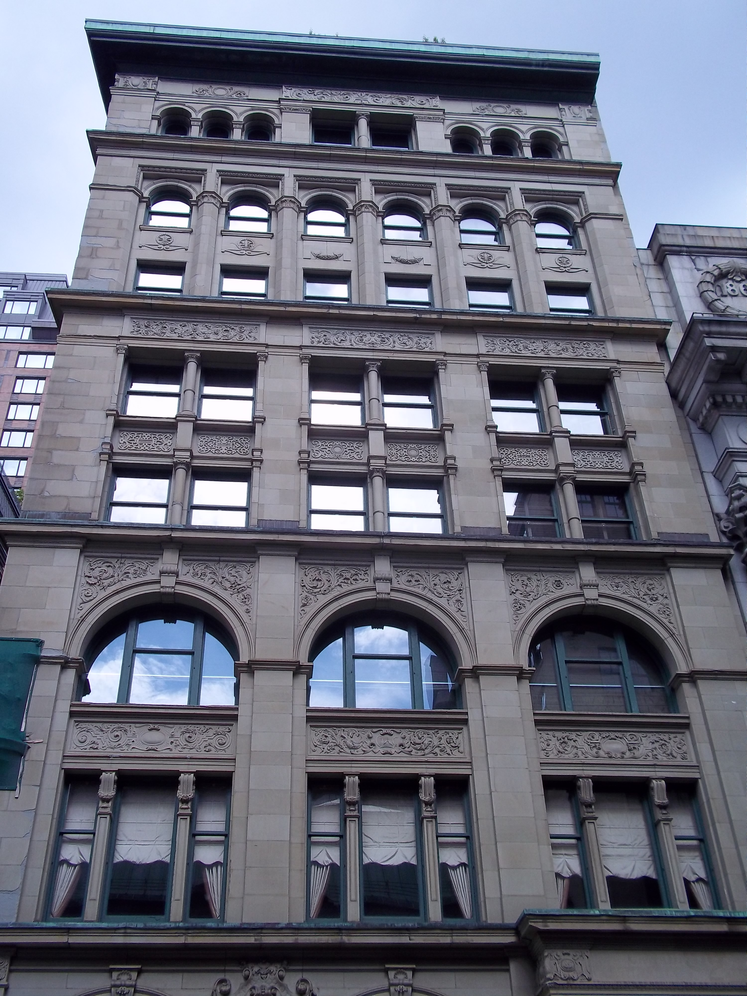 Édifice de la Canada Life, 275, rue Saint-Jacques, Montréal info